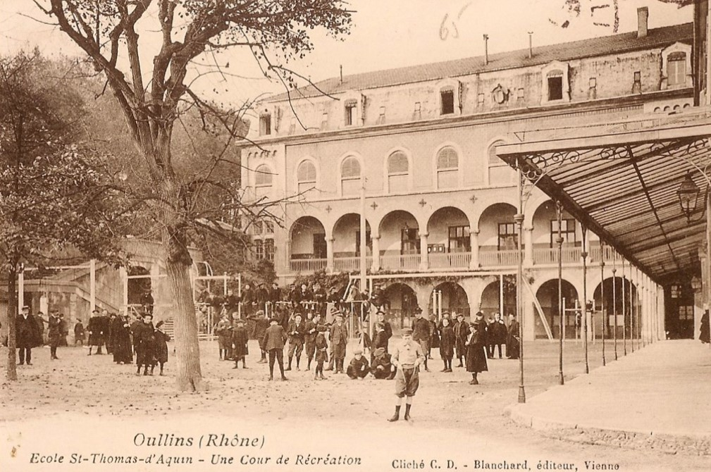 Deuxième terrasse de l'école Saint-Thomas d'Aquin Oullins